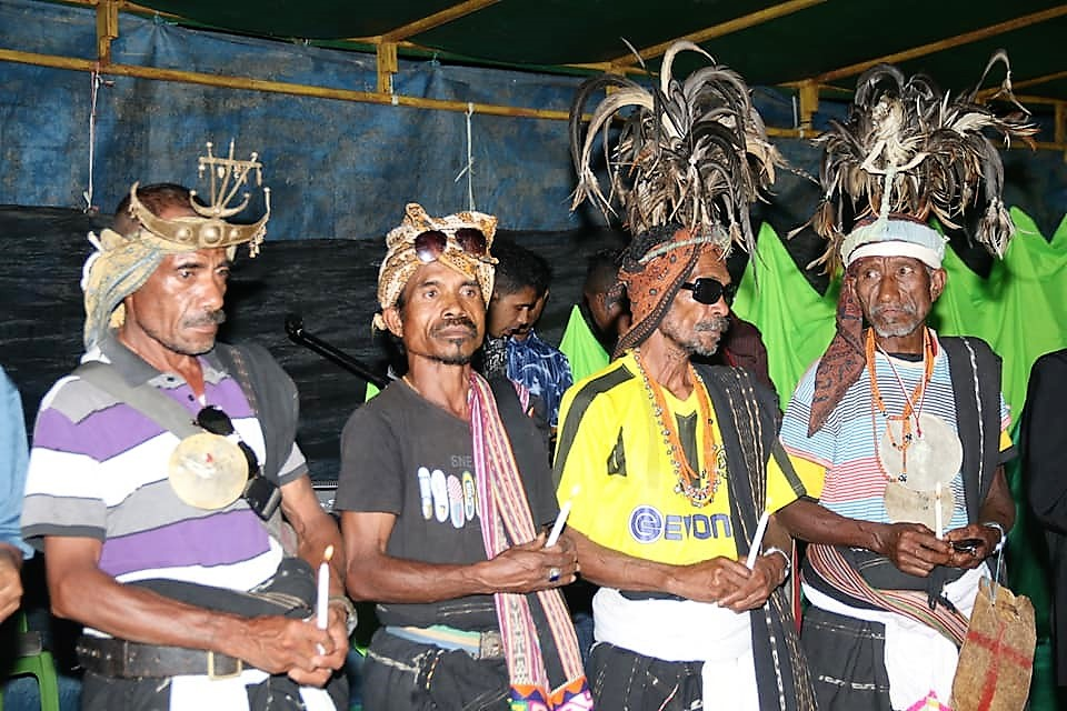 Würdenträger von Hautoho, Osttimor